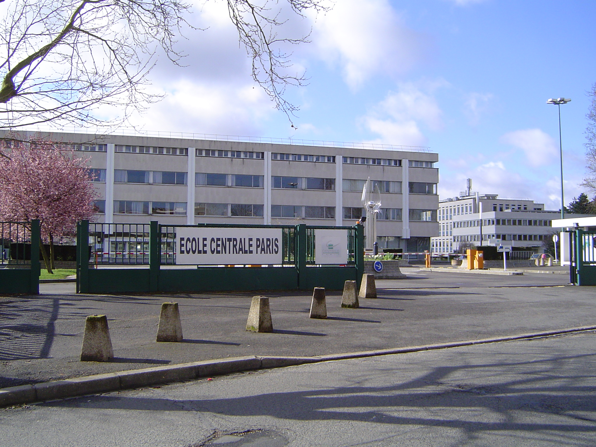 Entrée de l'école Centrale